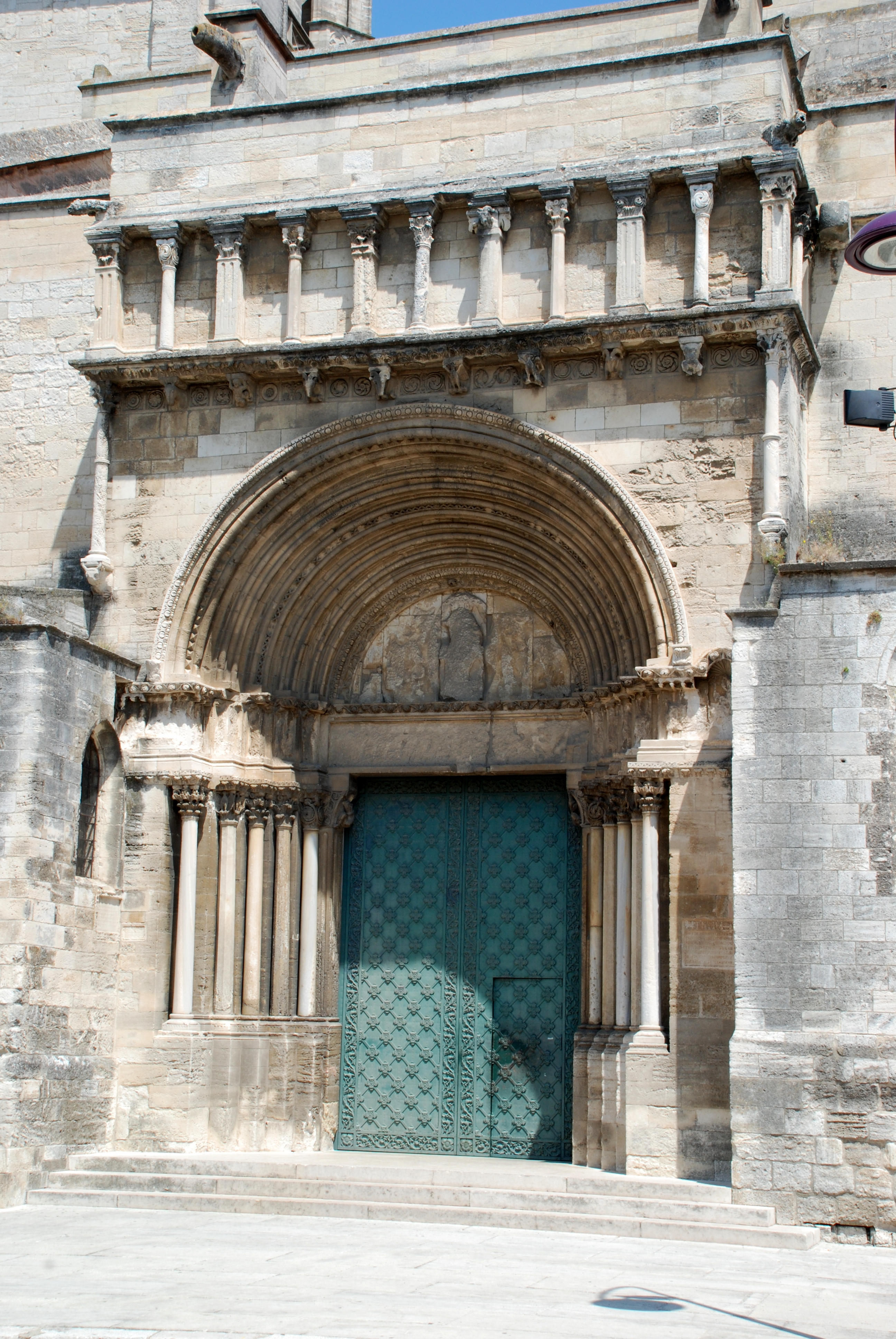 France - Provence - Tarascon - Église Sainte-Marthe de Tarascon